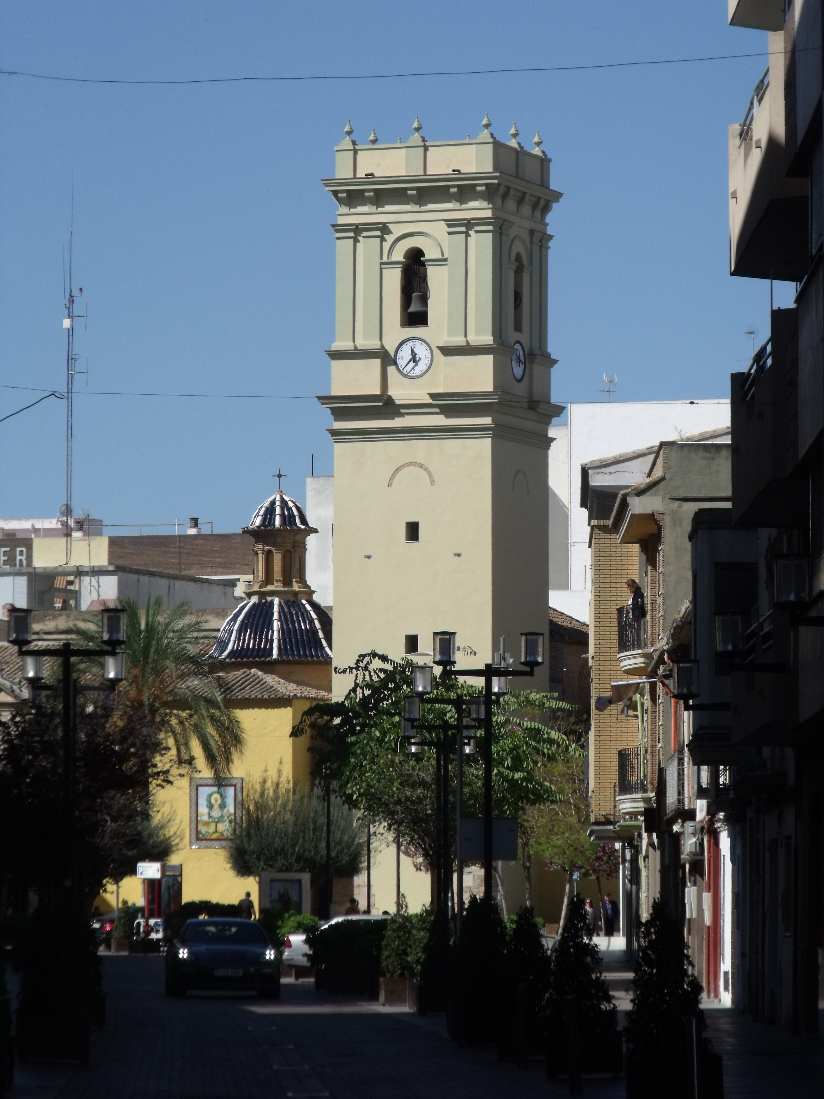 Campanari de l'Església Parroquial de la Mare de Déu de l'Olivar d'Alaquàs.